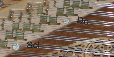 repère pour les cordes Sol et Do sur un qanoun arabe